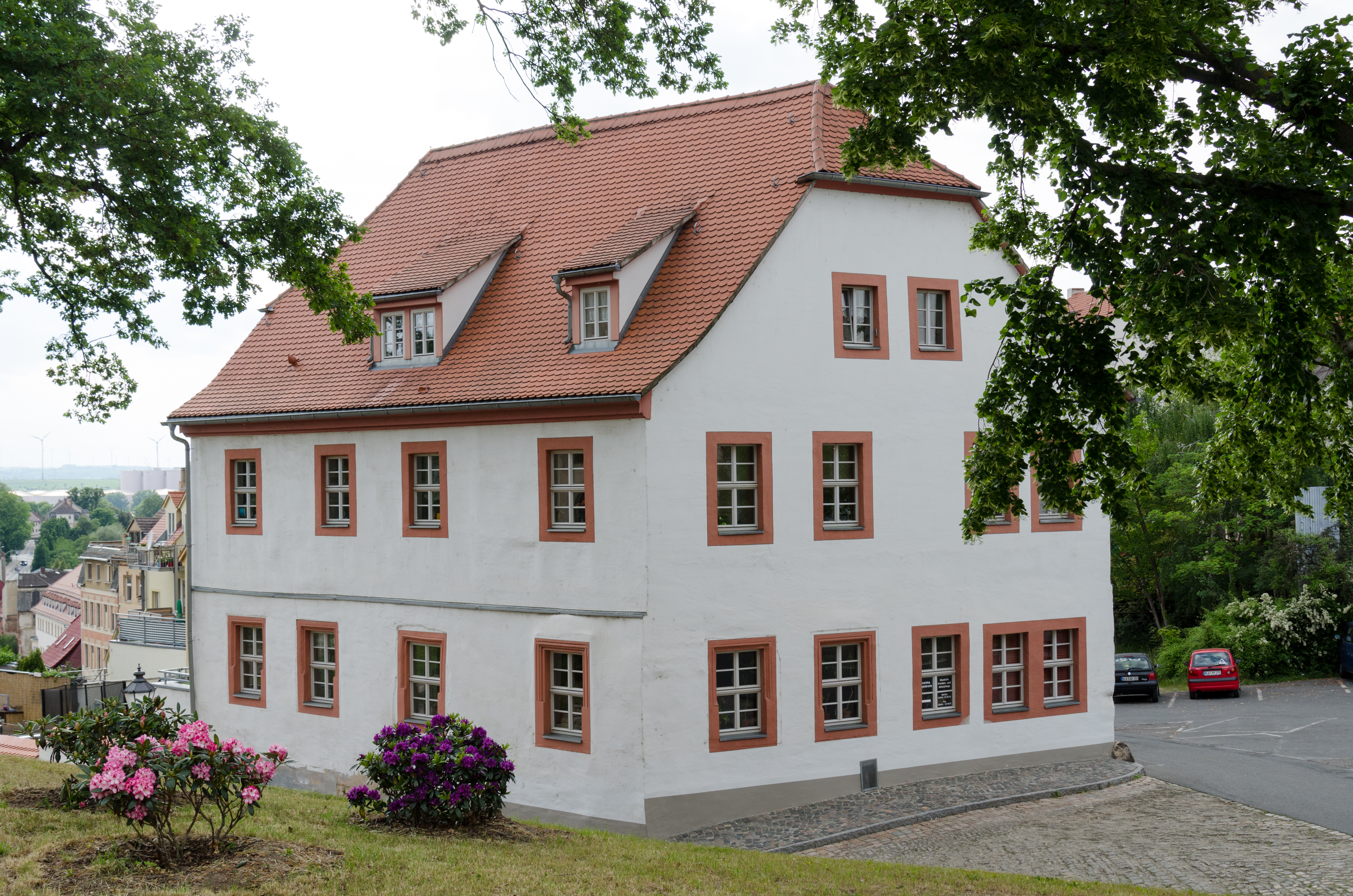 Zeitz, Rothestraße 1